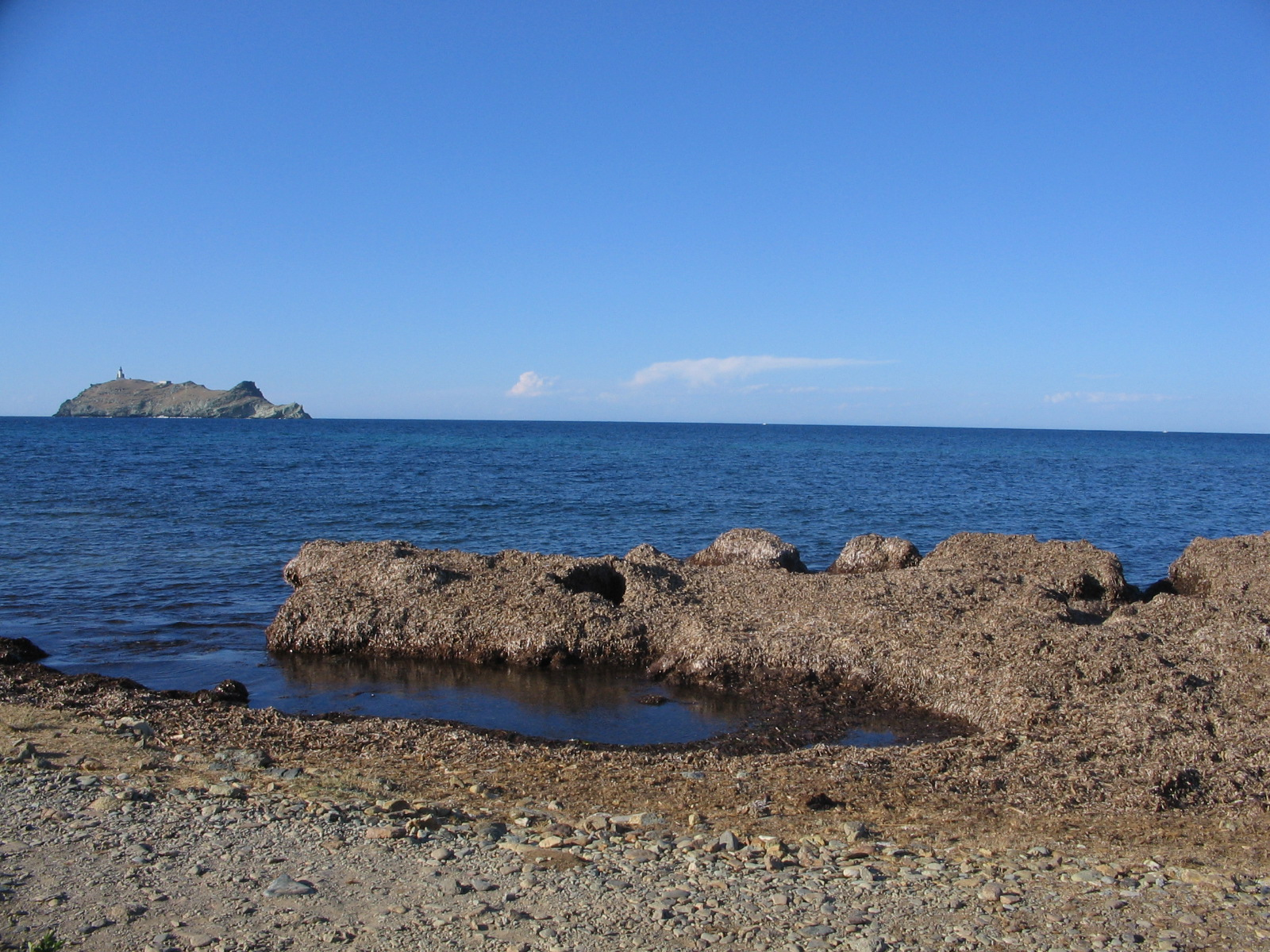 Banquette de Posidonia oceanica. Cap Corse. Barcaggio (plage de Cala). À l'arrière plan : île de la Giraglia.